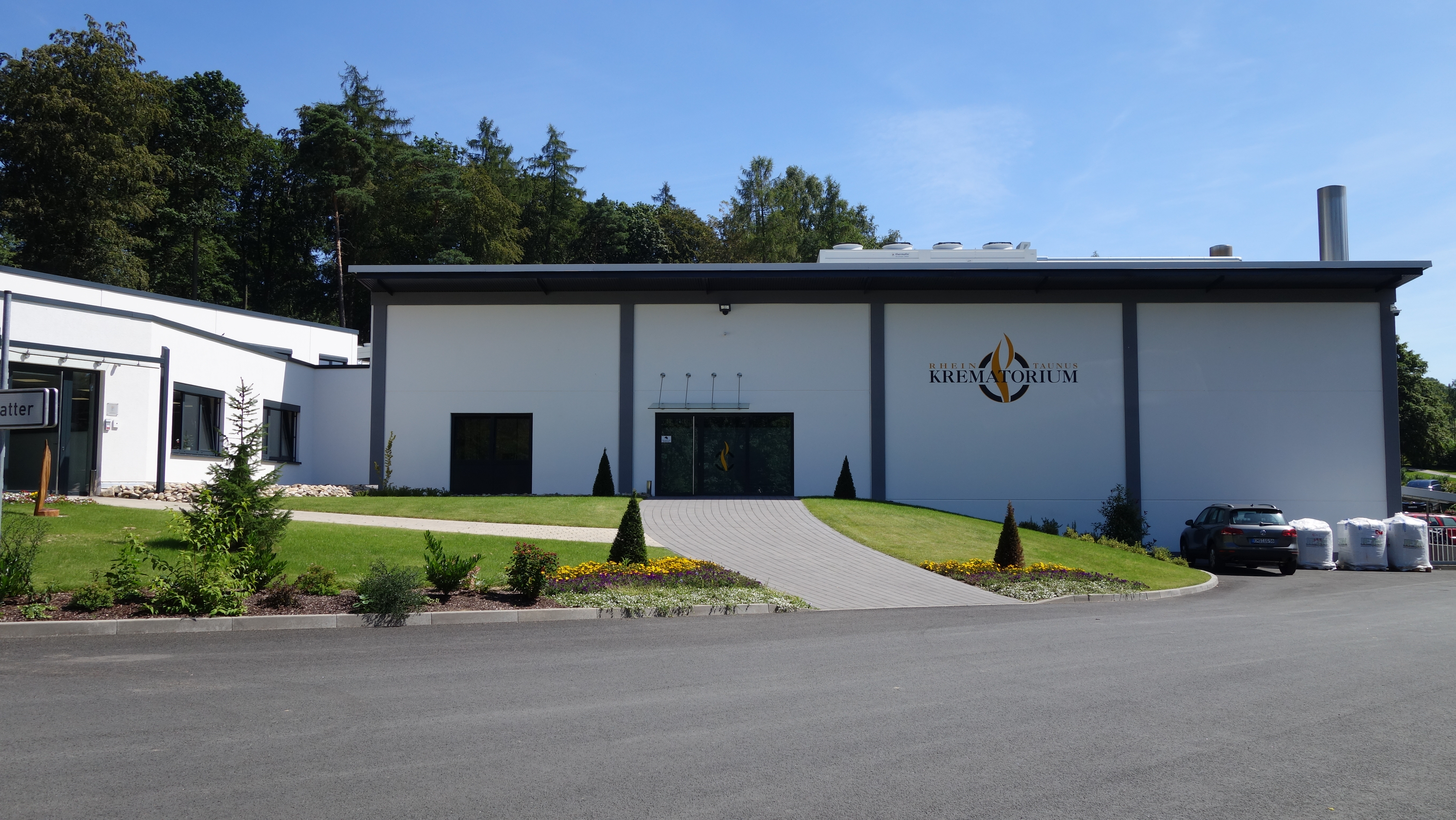 Rhein-Taunus Krematorium in Dachsenhausen, Blick auf Eingang und Abschiedsraum